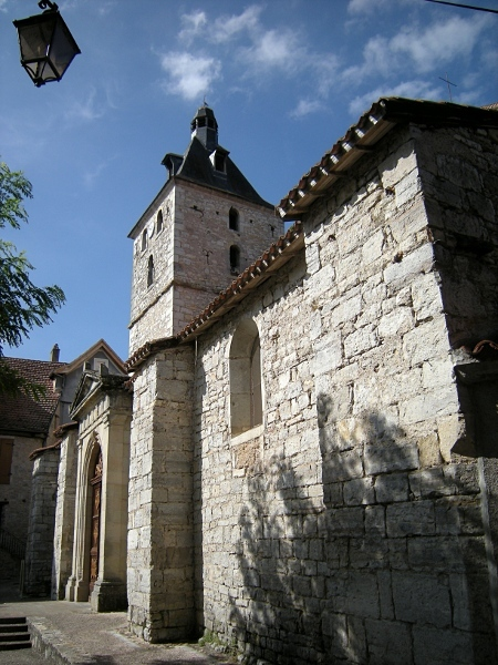 Église de Cajarc dans le département du Lot (France)